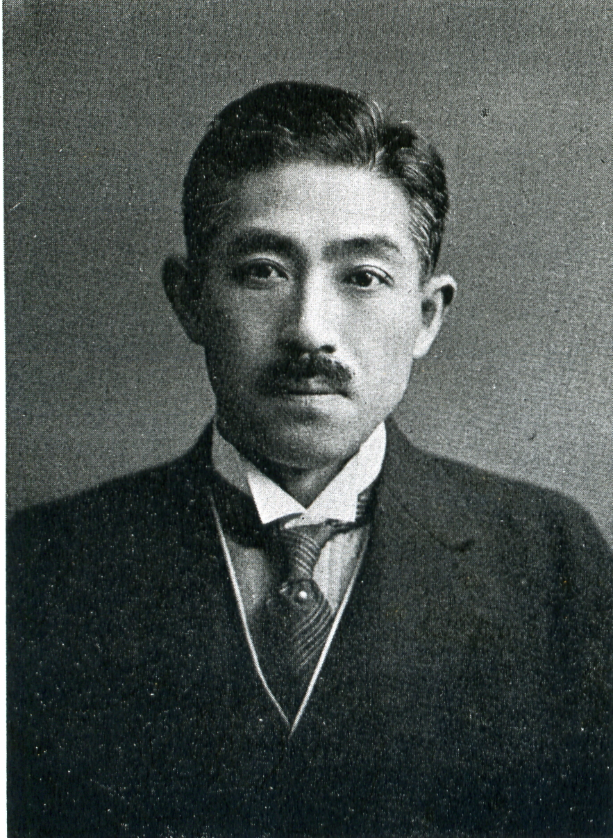 この写真は、米田規矩馬の写真です。